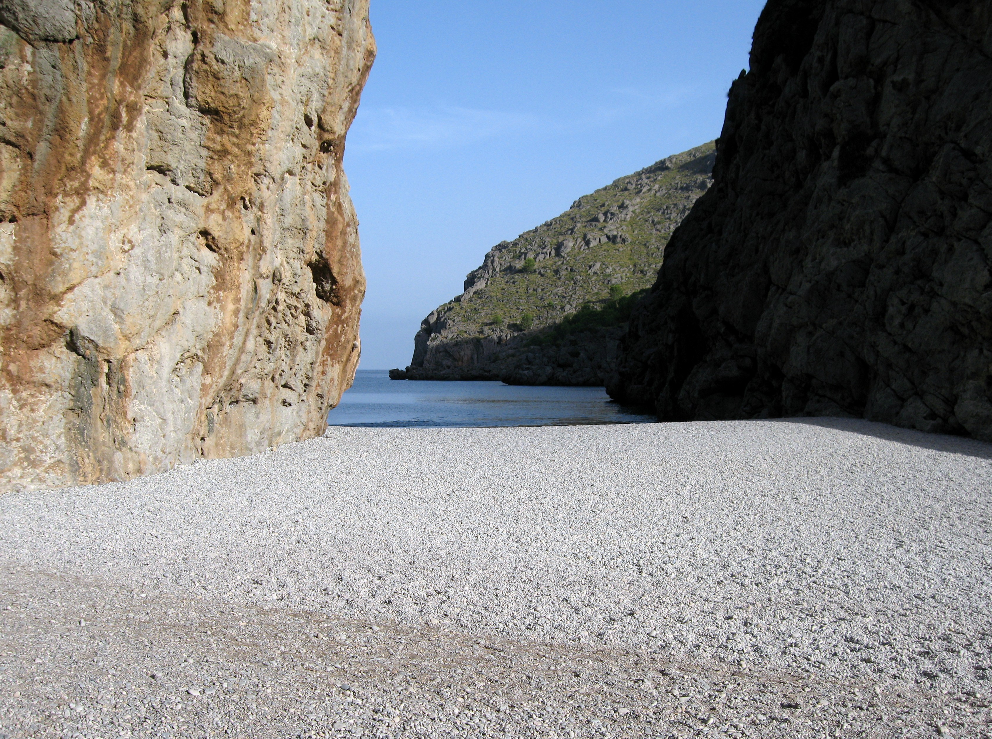 Torrent de Pareis, Escorca, Mallorca, Spain